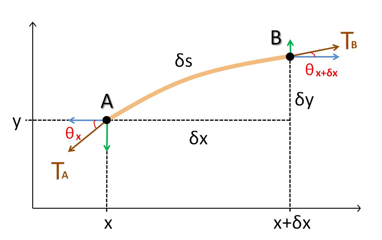 振動する弦の一部分の様子を表す。